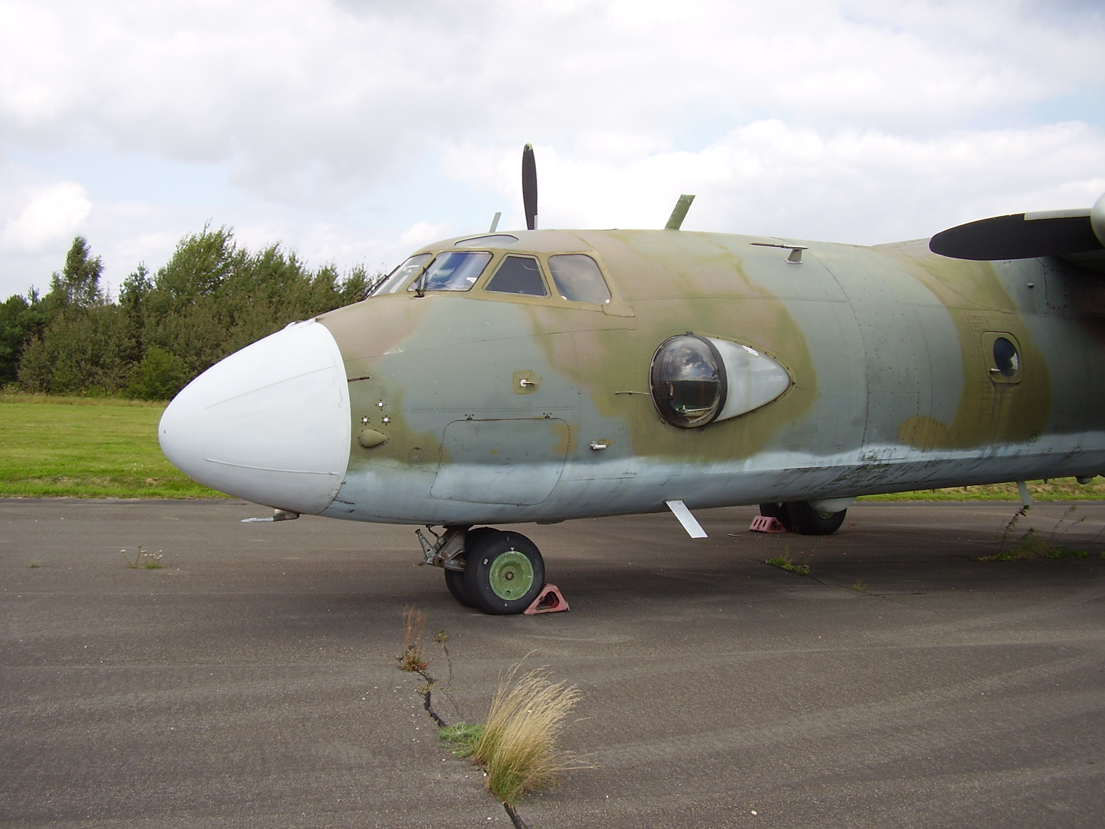 Luftwaffenmuseum der Bundeswehr; Airforce Museum of the Bundeswehr; Berlin-Gatow